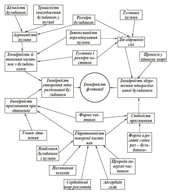 Фото